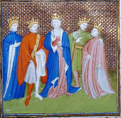 Královna Klotylda se syny